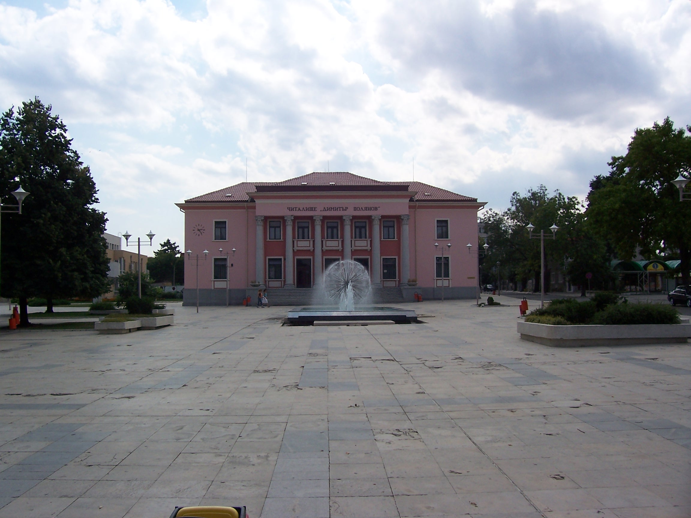 Площад "Трети Март"; автор © 2006 Димитър Колев